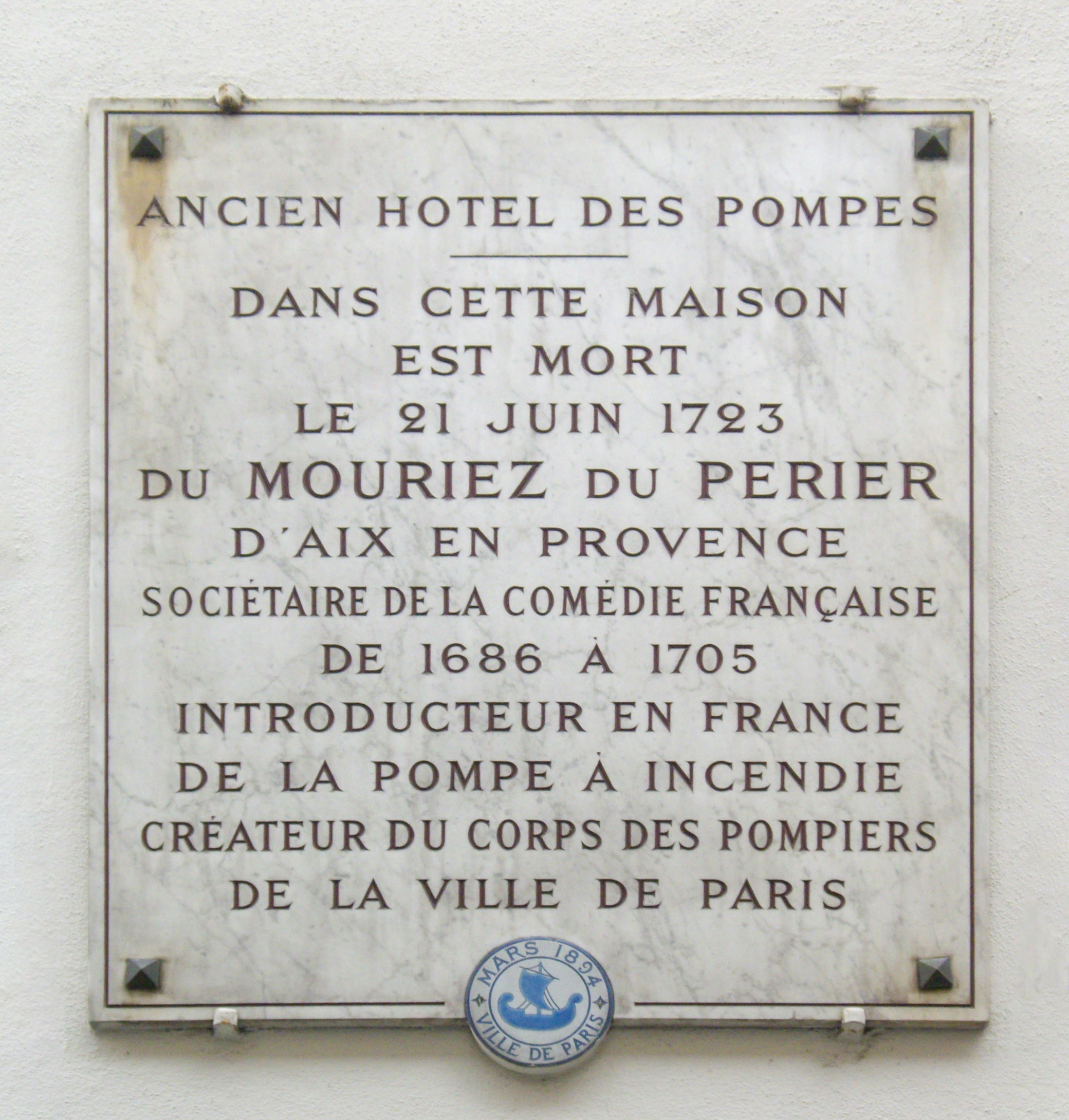 Plaque apposée au n° 30 de la rue Mazarine, Paris 6e. « Ancien Hôtel des Pompes. Dans cette maison est mort le 21 juin 1723 du Mouriez du Perier d'Aix en Provence, sociétaire de la Comédie française de 1686 à 1705, introducteur en France de la pompe à incendie, créateur du corps des pompiers de la ville de Paris. »